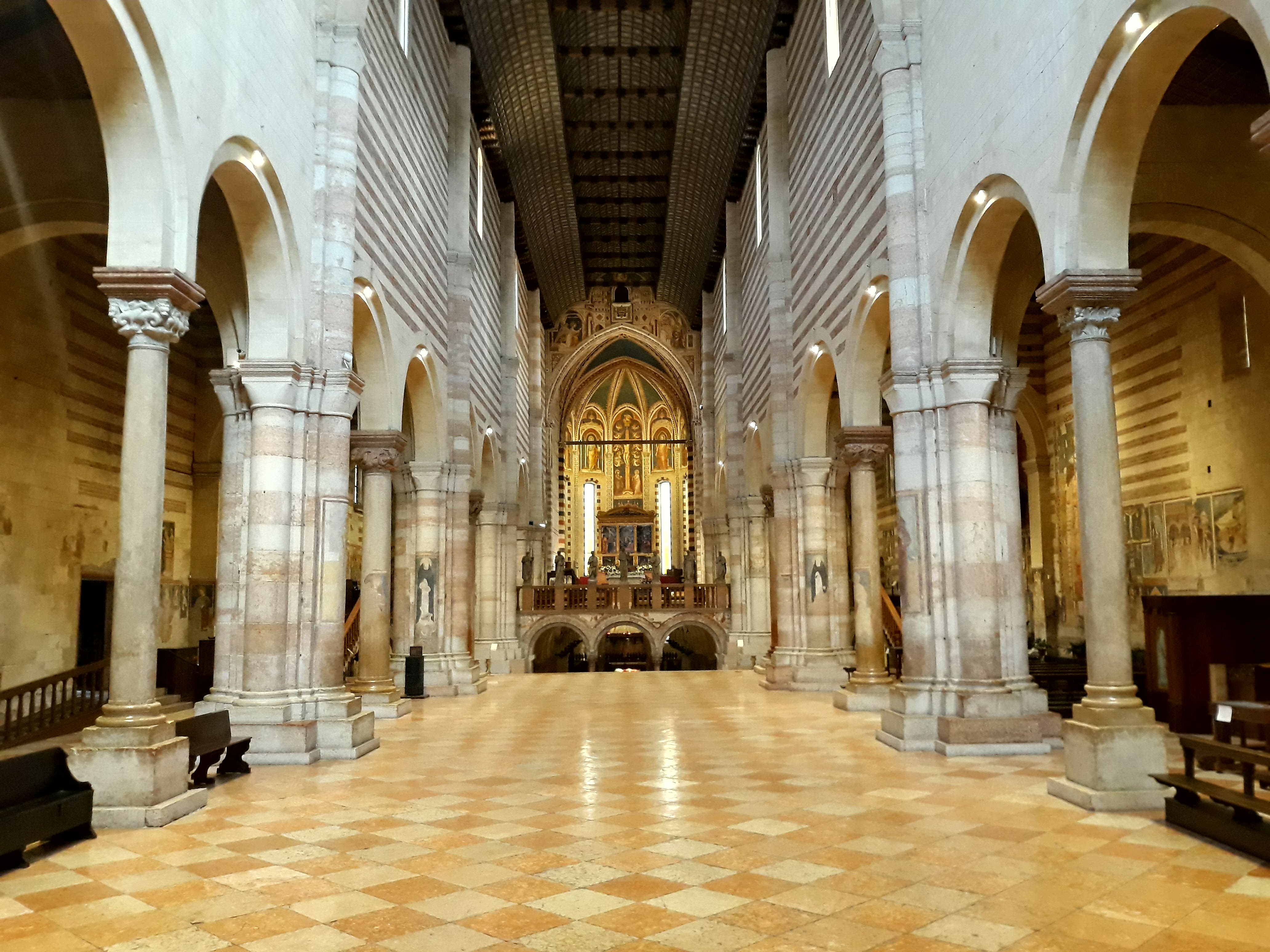 Interno della basilica di San Zeno a Verona